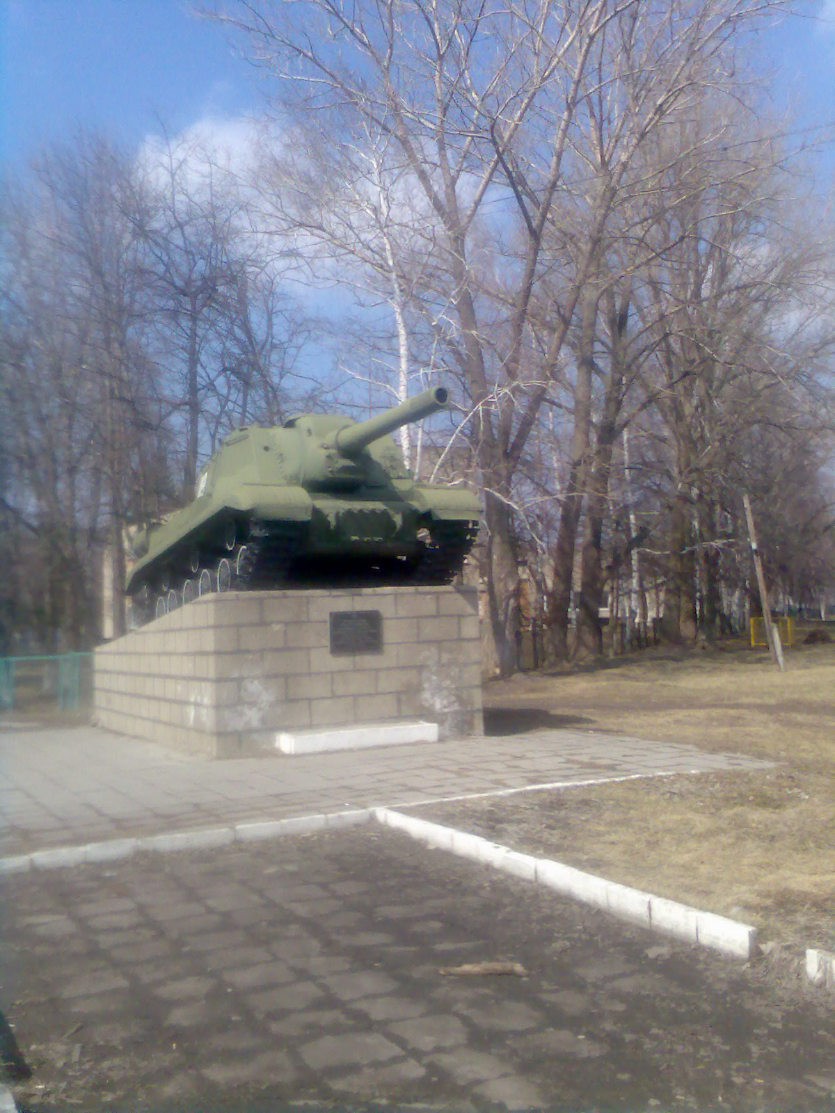 Танк у смт. Золочів, Харківська область